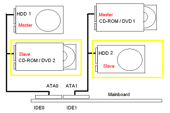 ATA-Konfiguration eines "normalen" PCs. 2 Laufwerke (Festplatte, DVD-Laufwerk) als "Master" je an einem IDE-Schnittstellenkabel ist die Ausgangsbasis. - Die gelb umrahmten zusätzlichen Laufwerke kommen ggf. als "Slave" hinzu.